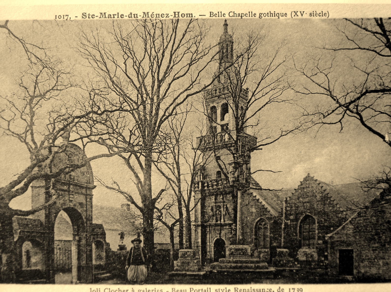 La chapelle de Sainte-Marie-du-Ménez-Hom vers 1910 (carte postale, auteur inconnu).